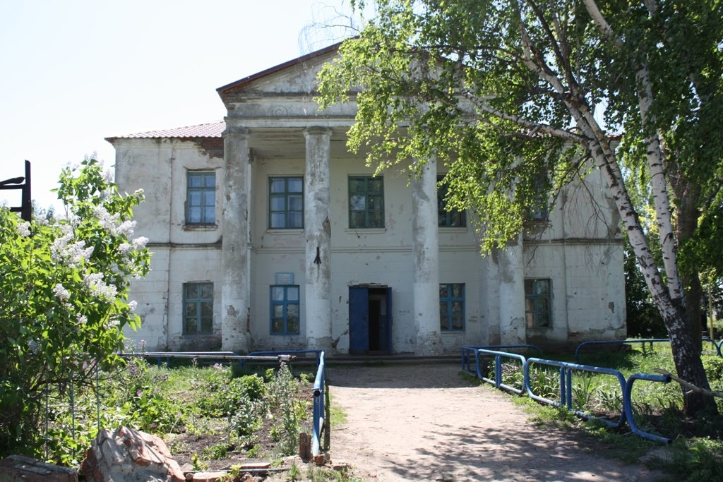 Культурно-досуговый центр в селе Сиалеевская Пятина